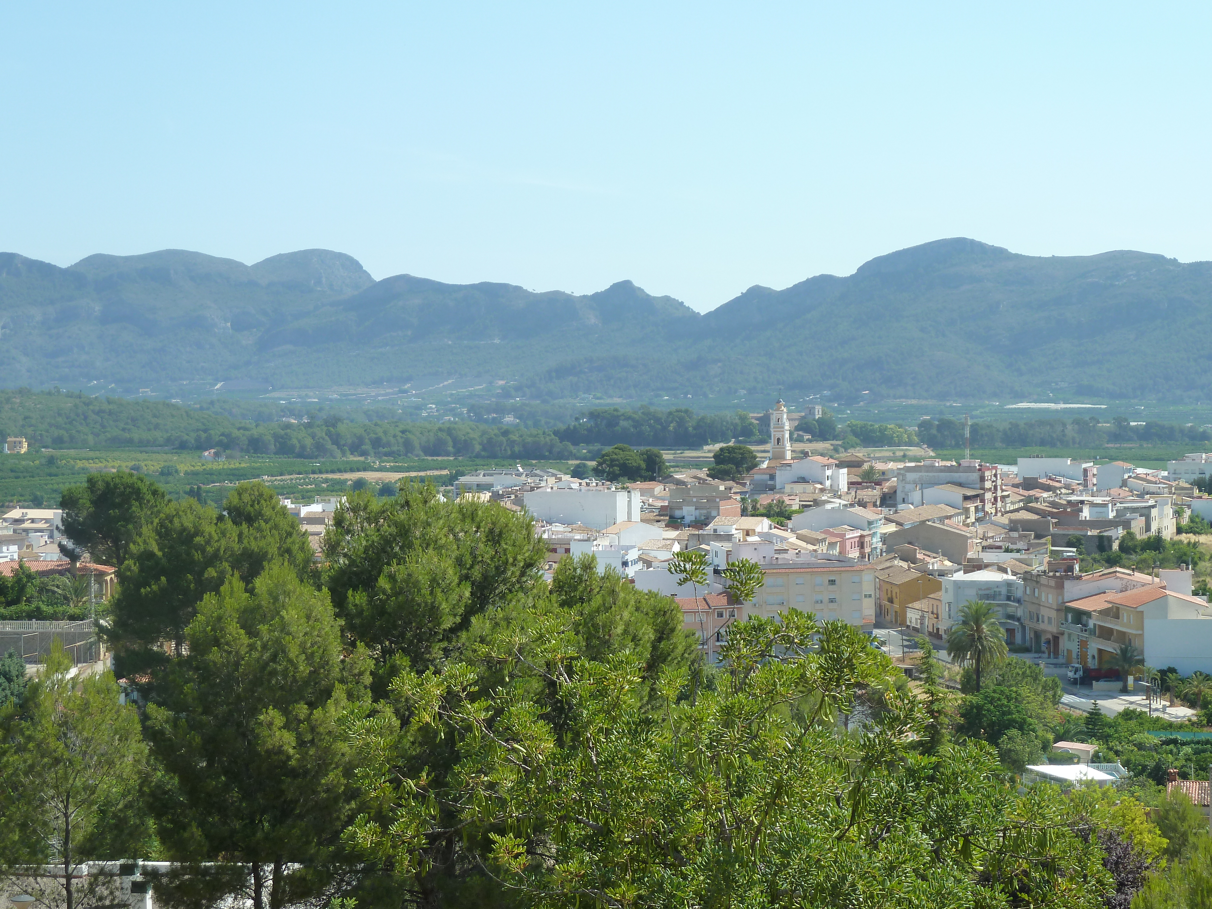 Ròtova municipi de València